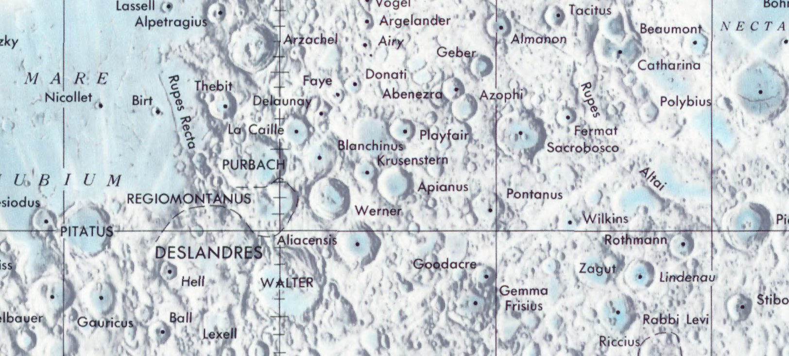 Cráter lunar Apianus. Localización. (Lunar Chart LPC1. Second Edition)